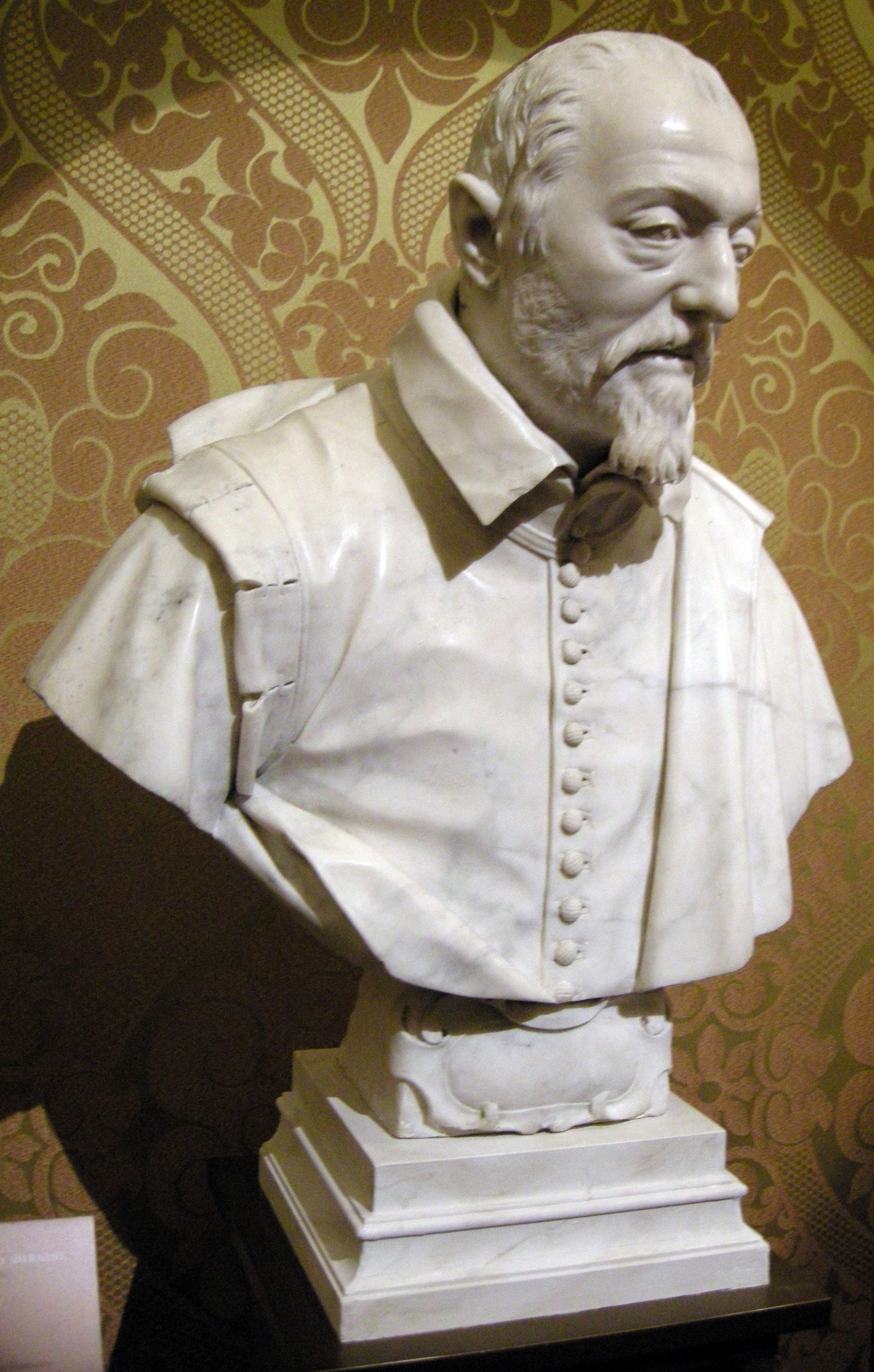 1622, museo di san giovanni dei fiorentini